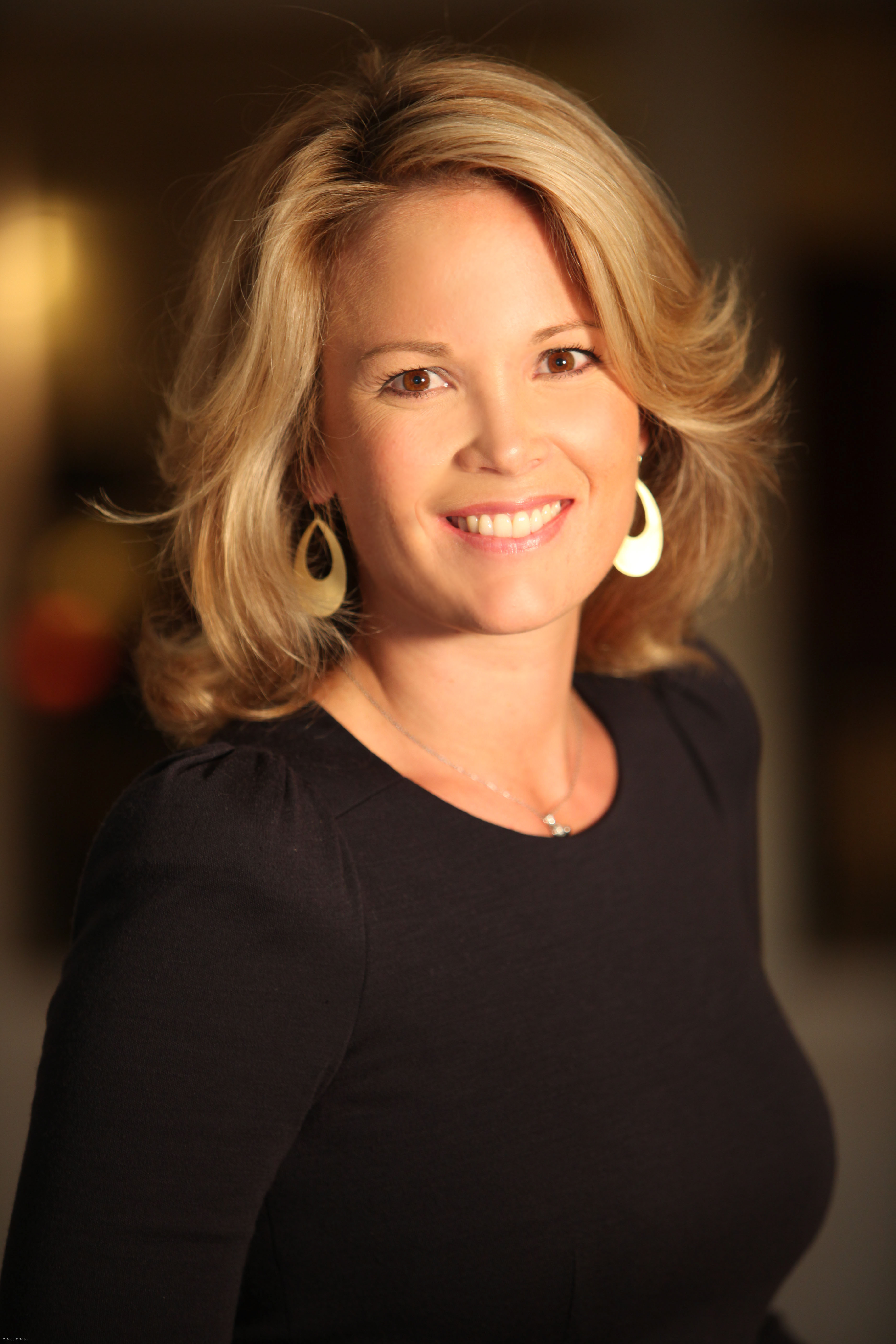 Stephanie zu Guttenberg, Ehefrau von Karl-Theodor zu Guttenberg, bei einem Interview mit dem Christlichen Medienmagazin pro am 6. September 2010 in Berlin